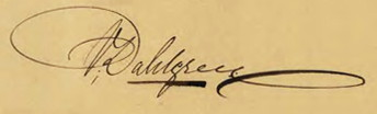 Carl Peter Dahlgrens namnteckning på ett dokument från 1855